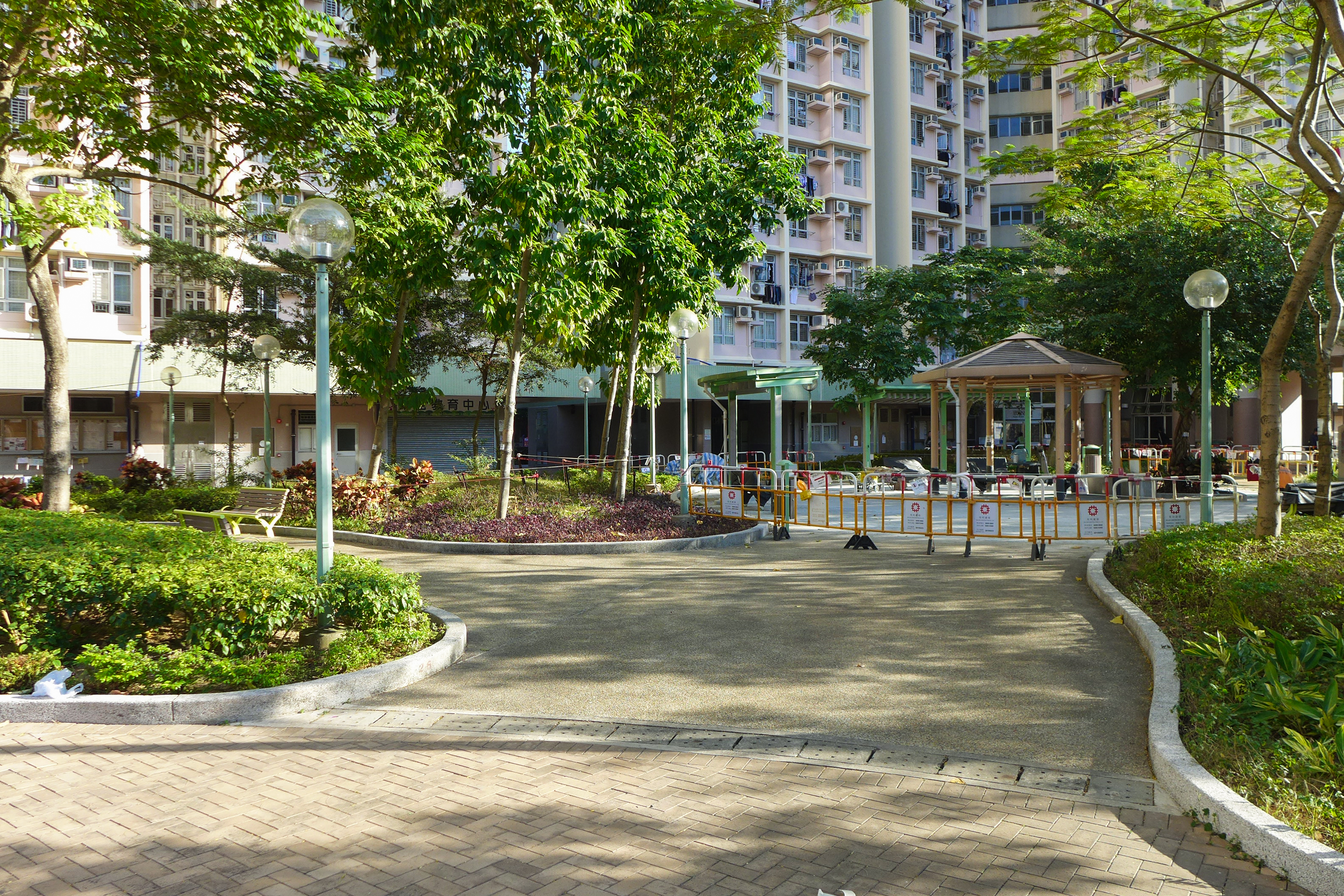 Yan On Estate Landscape Area